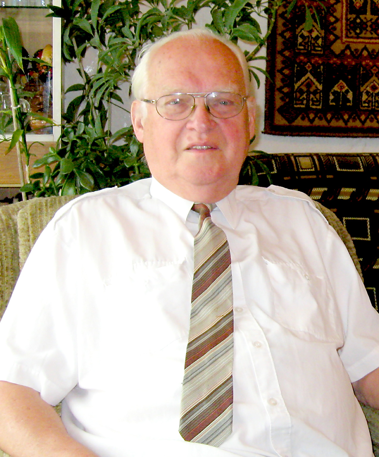 Prof.Dr. Manfred Lorenz, geb. 06.10.1029